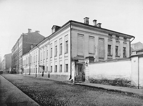 182. Городская типографiя (домъ бывш. Лопыревскаго въ Козицкомъ пер.) (Москва)